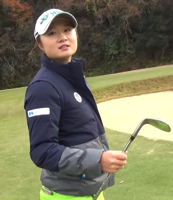 ringolfのYouTube動画に出演する森田遥（魯婉遥）